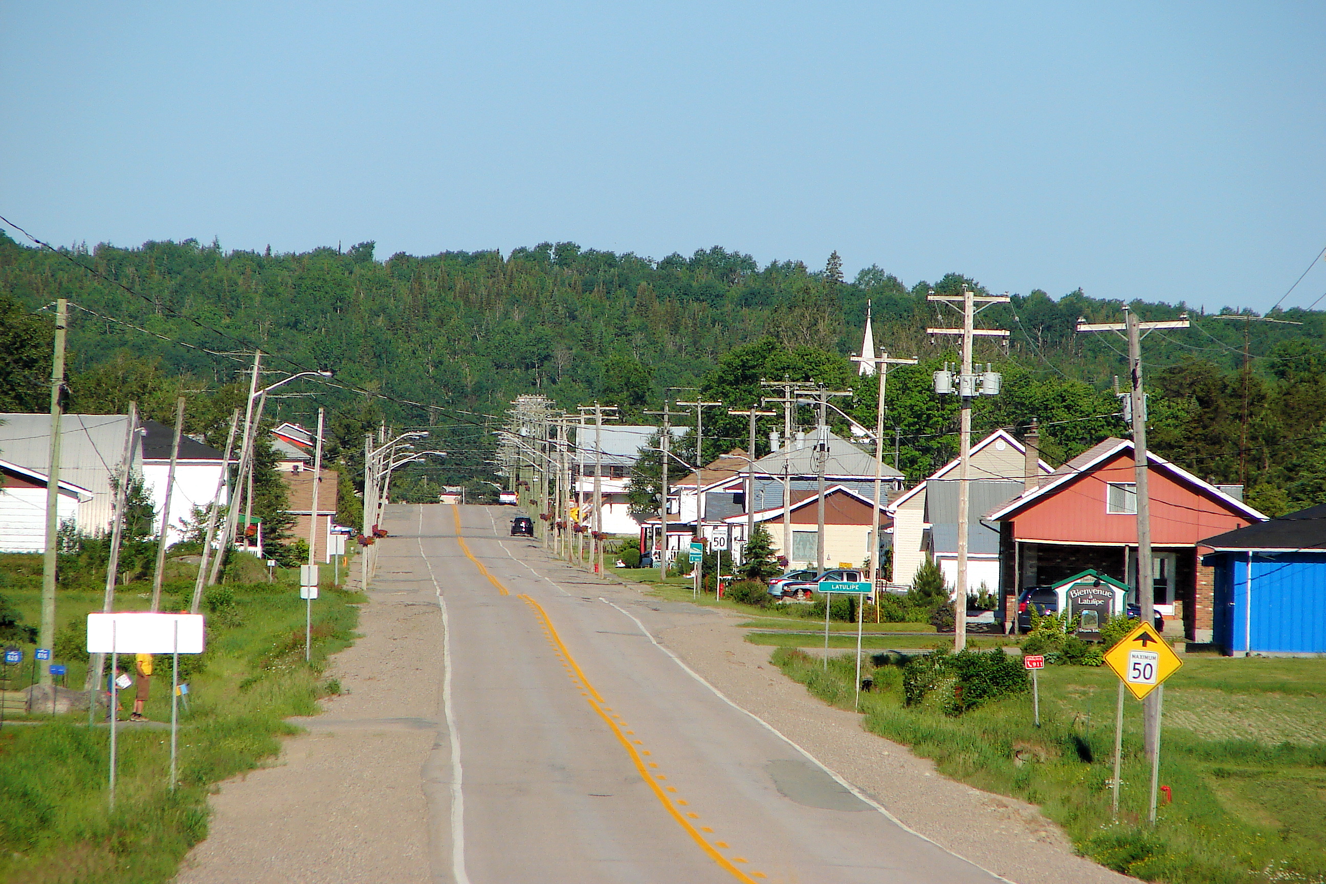 Latulipe, Quebec, Canada